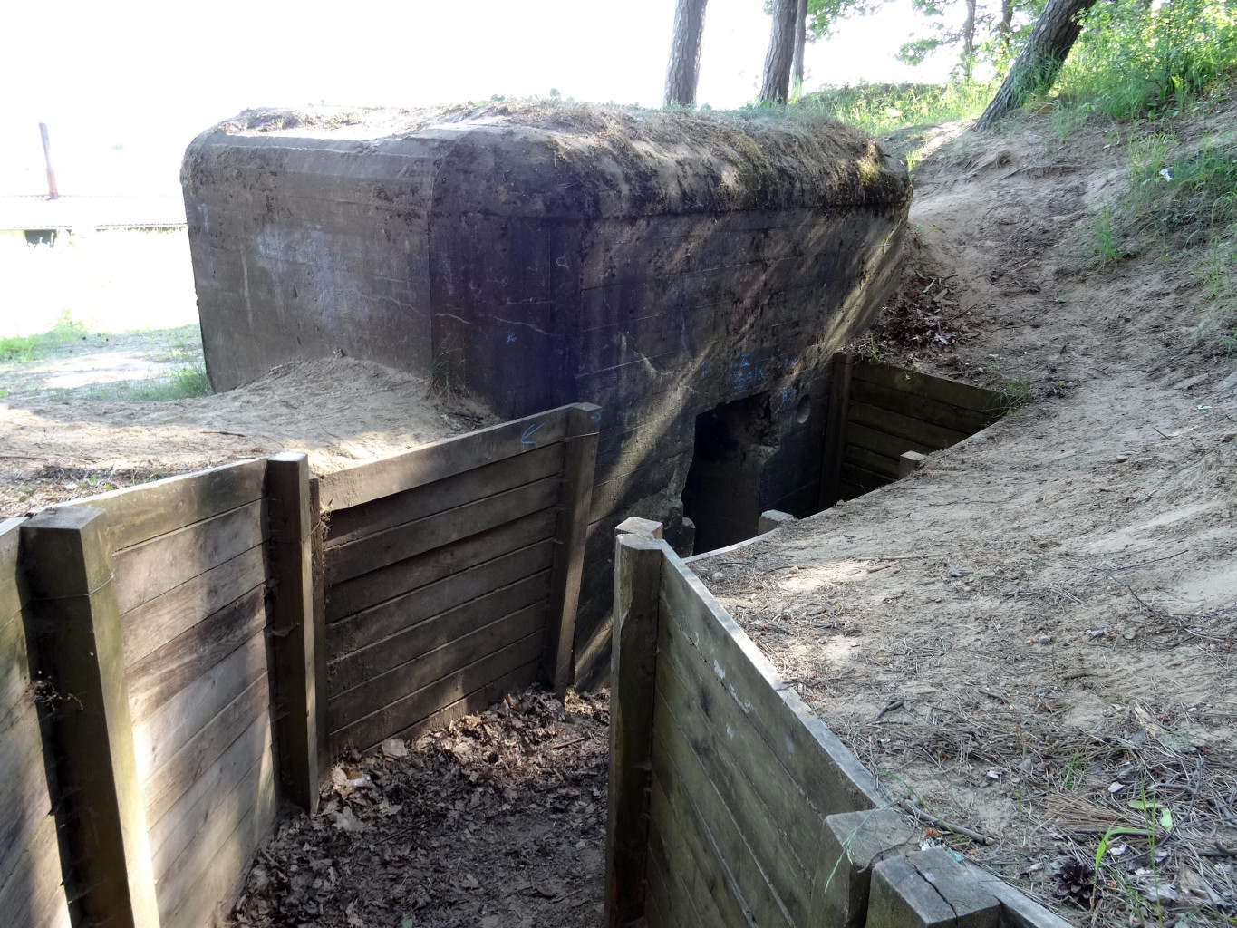 Przedmoście Bydgoskie, schron nr 5 koło Kruszyna, skansen - fortyfikacje Wojska Polskiego użyte w wojnie obronnej Polski w 1939 roku